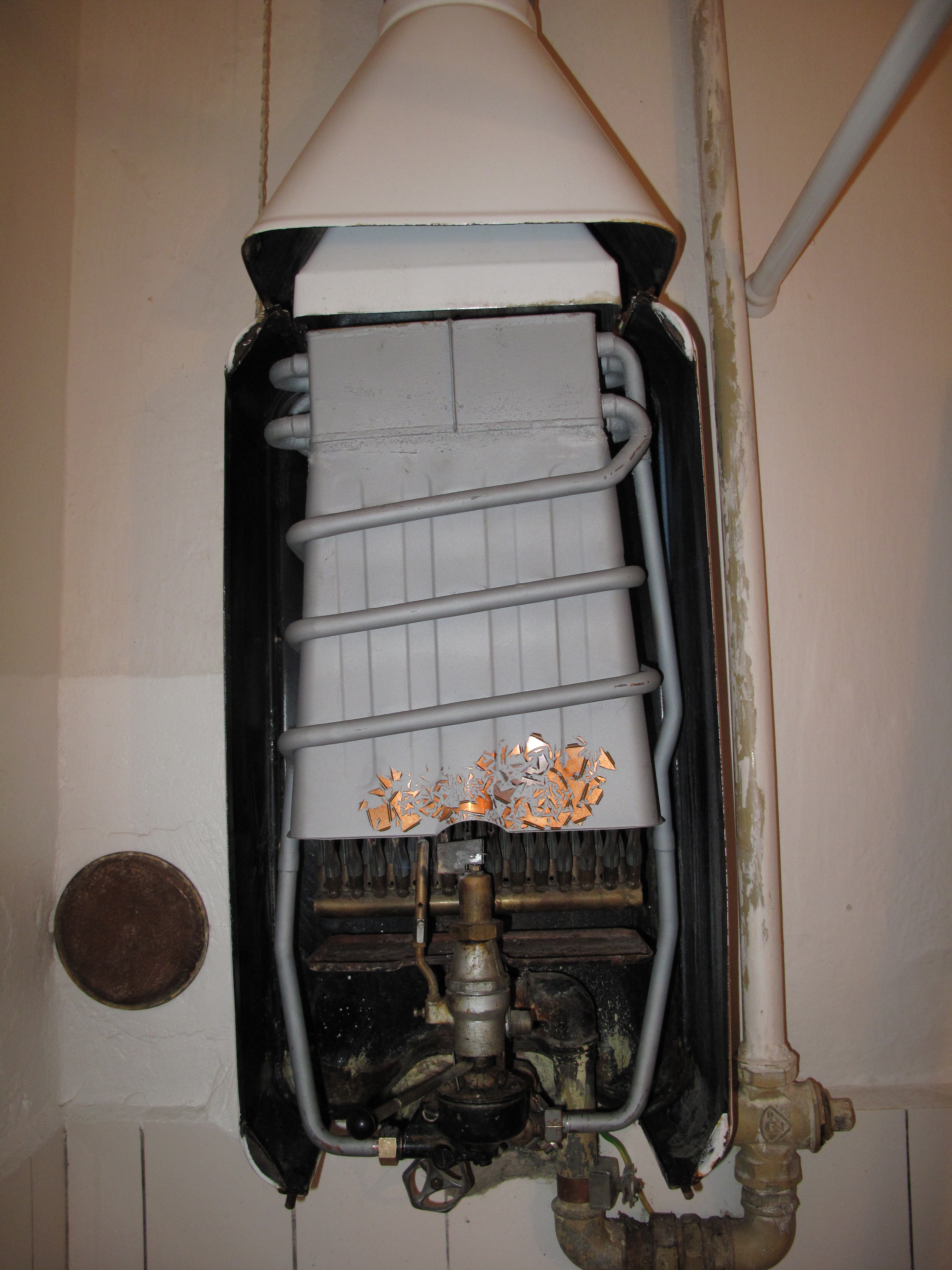 Loupání barvy nového výměníku karmy Mora PO 35.